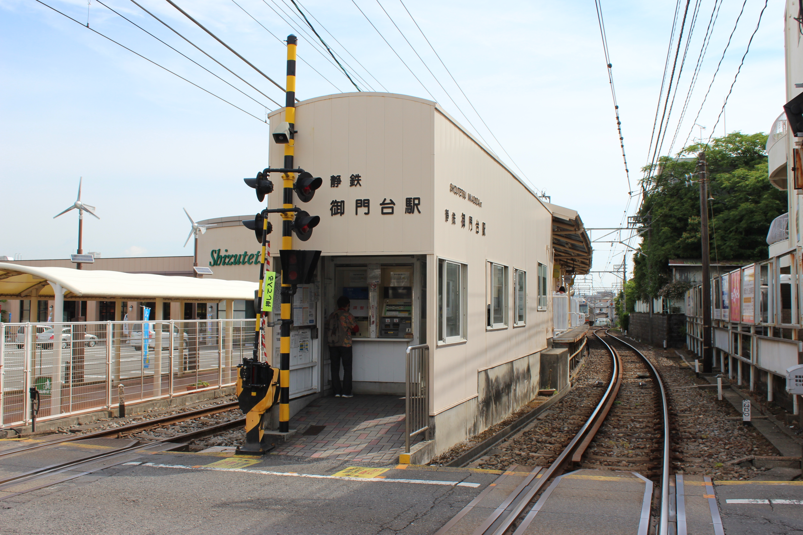 御門台駅